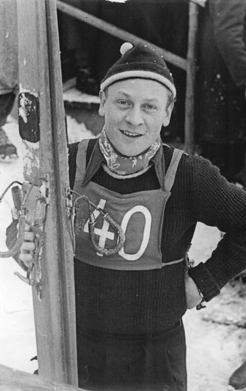 Zentralbild Quasch. 16.2.1953 IV. Wintersportmeisterschaften der Deutschen Demokratischen Republik für Frieden, Einheit, Demokratie und Sozialismus vom 10. - 15.2.1953 in Oberhof Sondersprunglauf auf der Thüringen-Schanze UBz: Werner Lesser II, Sieger im Sondersprunglauf.